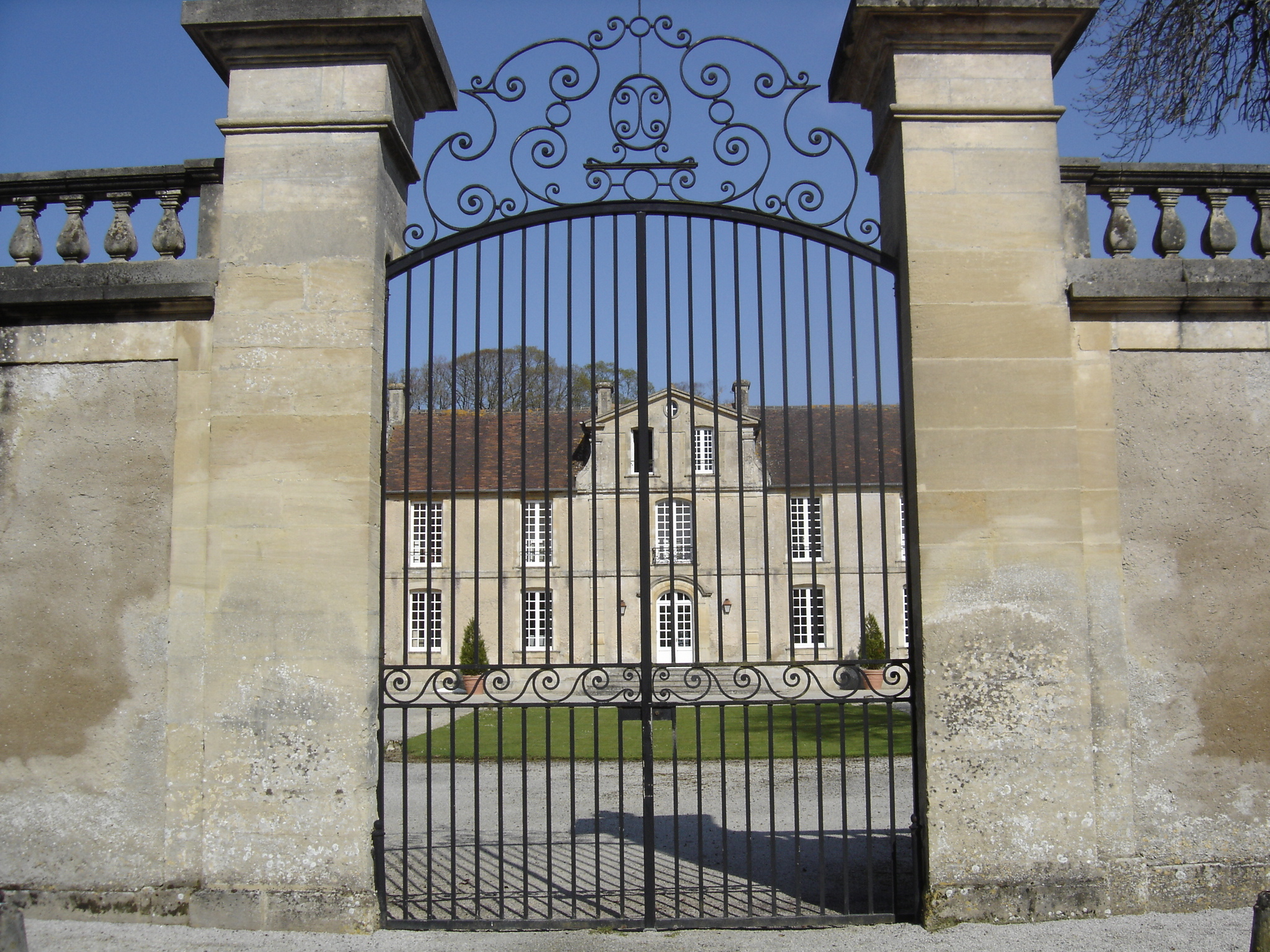 Château de Tournebu à Bény-sur-Mer, logis du XVIIè et XVIIIè siècles, et le portail du XVIIIè